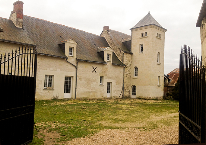 La Forgetterie, ferme manoir des XVI-XVIIème siécle à Vivy (49) Maine et Loire, France